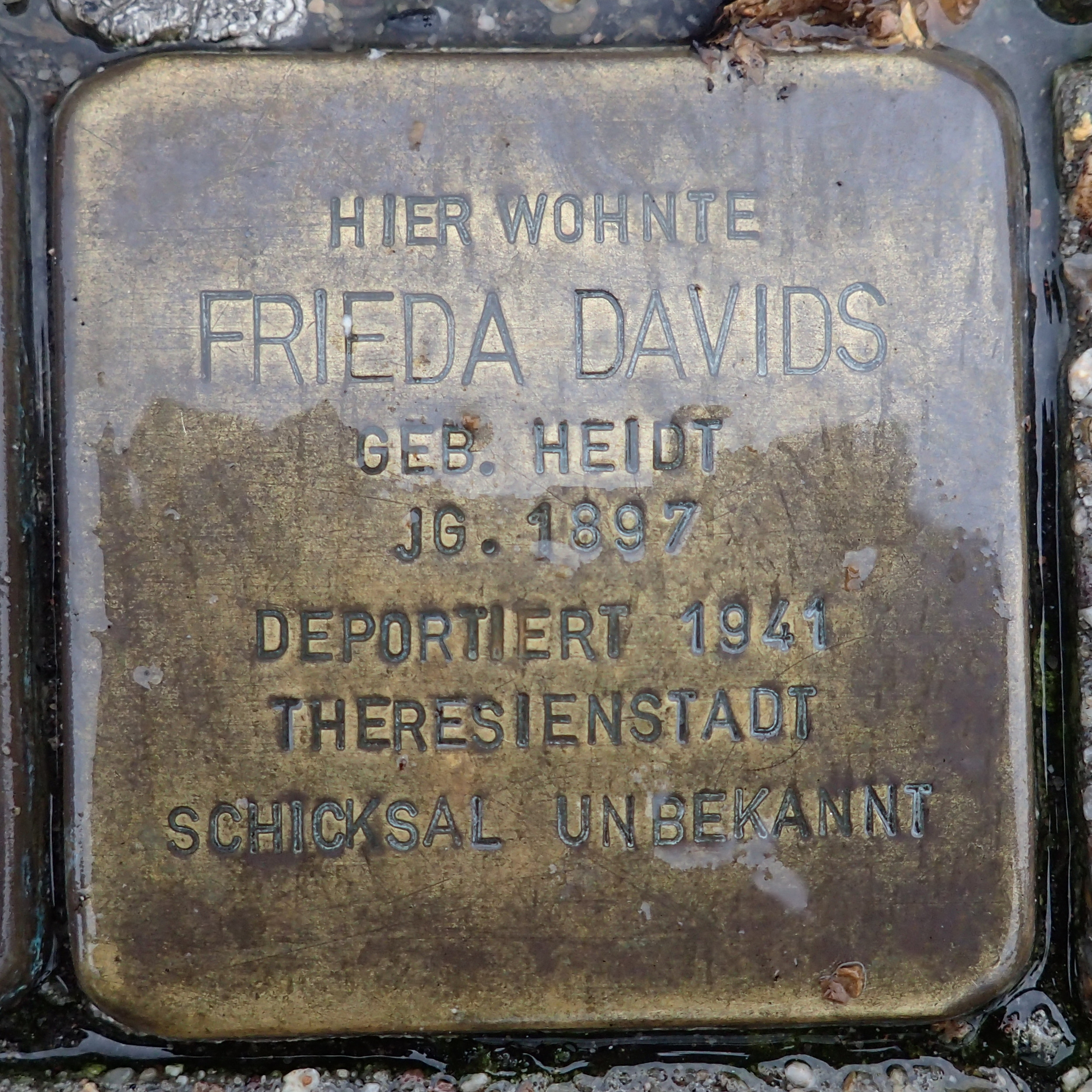 Stolperstein Geldern Brühlscher Weg 23 Frieda Davids